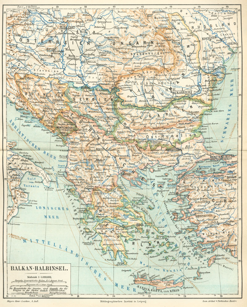 Karte der Balkan-Halbinsel (1 : 6 000 000)